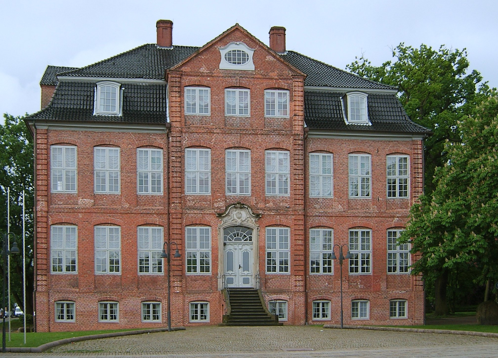 Pinneberg - Dingstätte 27 - Drostei - Baujahr: 1765-1767 - This is a photograph of an architectural monument.